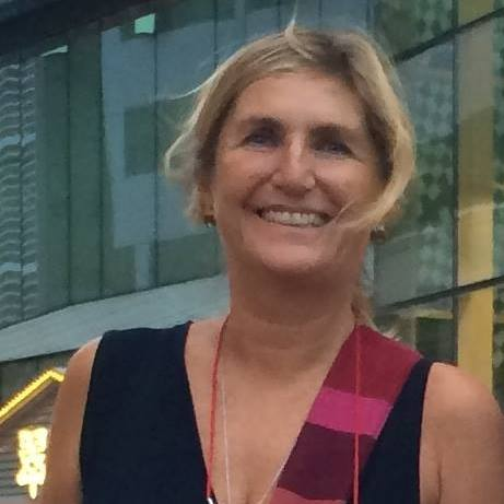 un primo piano di Barbara di Castri